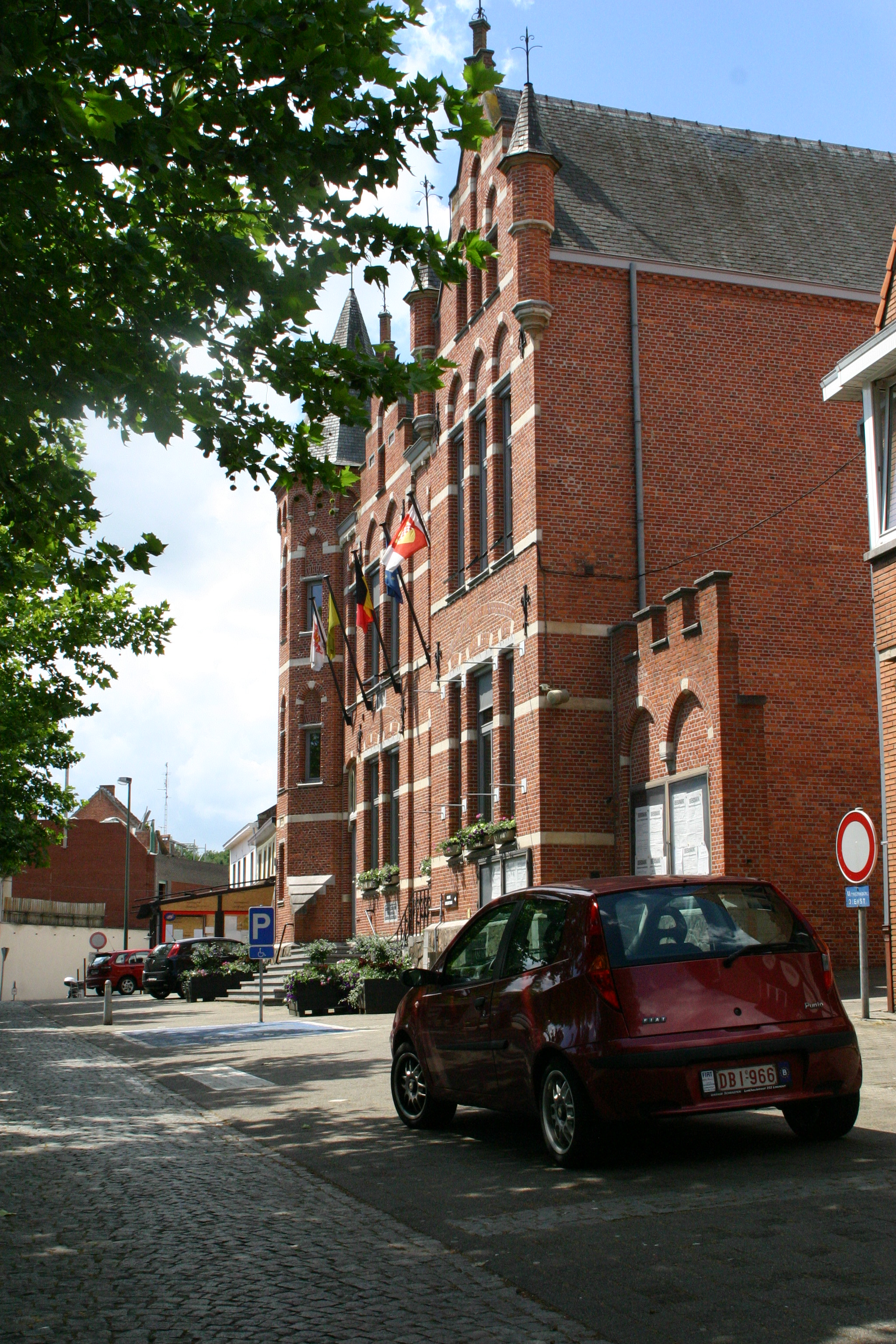 Gemengenhaus vu Lummen. Kategorie:Provënz Limburg